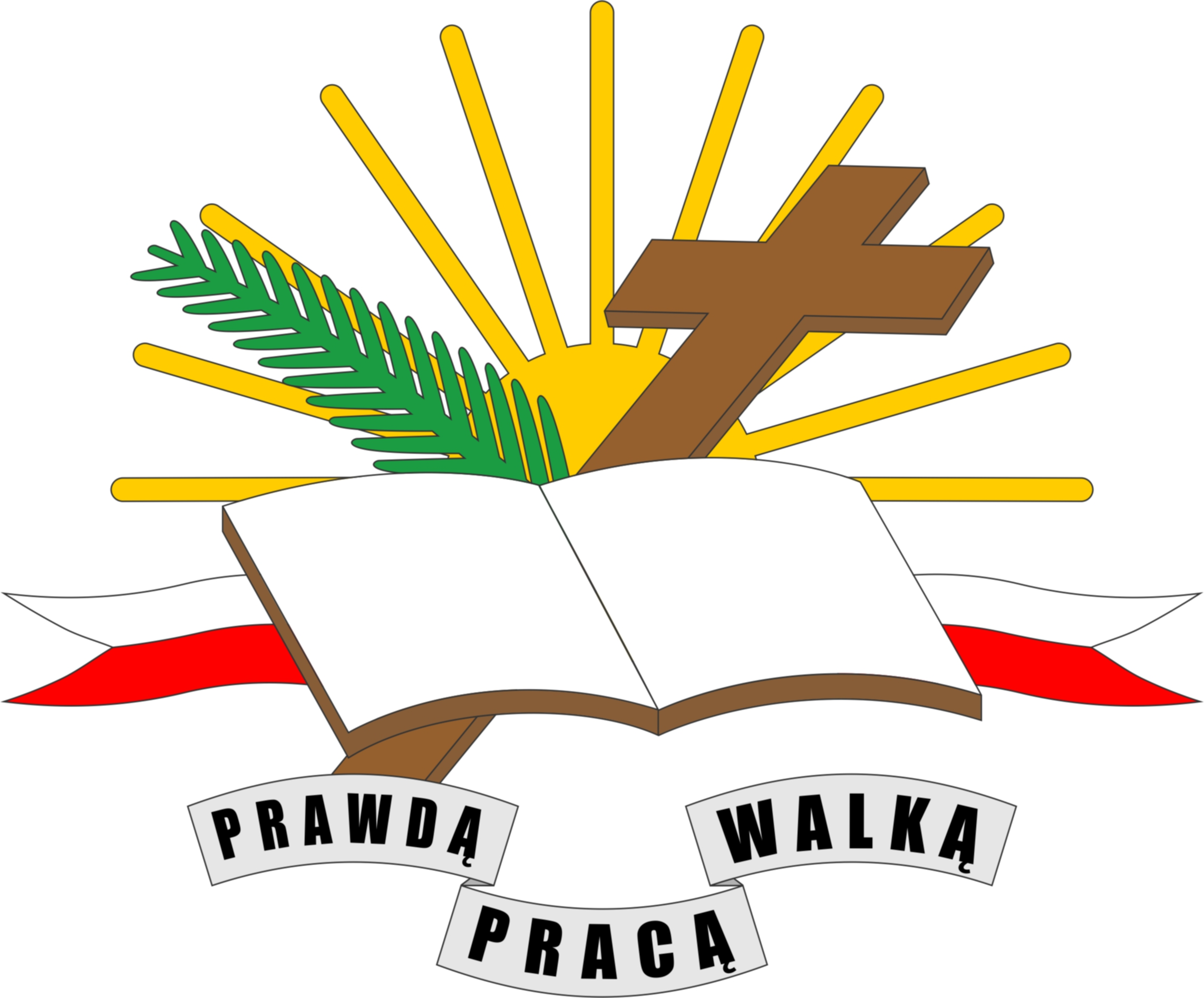 ROZŁOŻONA KSIĘGA - Przedstawia Słowo Boże, czyli Pismo Święte, które jest źródłem nauki o Panu Bogu i człowieku, o Jezusie Chrystusie i zbawieniu świata. SŁOŃCE I PROMIENIE - To symbol religijnej wolności, żarliwości i gorliwości w służbie Bożej, w wyznawaniu wiary świętej. KRZYŻ - To znak zbawienia, cierpienia i ofiary Jezusa Chrystusa PALMA - Symbol zasłużonego pokoju i sprawiedliwości oraz przypomnienie, że wszyscy ludzie mają żyć w pokoju, według zasad nauki Jezusa Chrystusa PRAWDĄ, PRACĄ, WALKĄ - Słowa te mówią, że naukę Jezusa Chrystusa mamy wypełniać w życiu przez głoszenie prawdy i życie zgodne z prawdą; chrześcijanin ma rzetelnie pracować tak dla chwały Bożej jak i dla pożytku osobistego, swojej rodziny, Narodu i Ojczyzny.